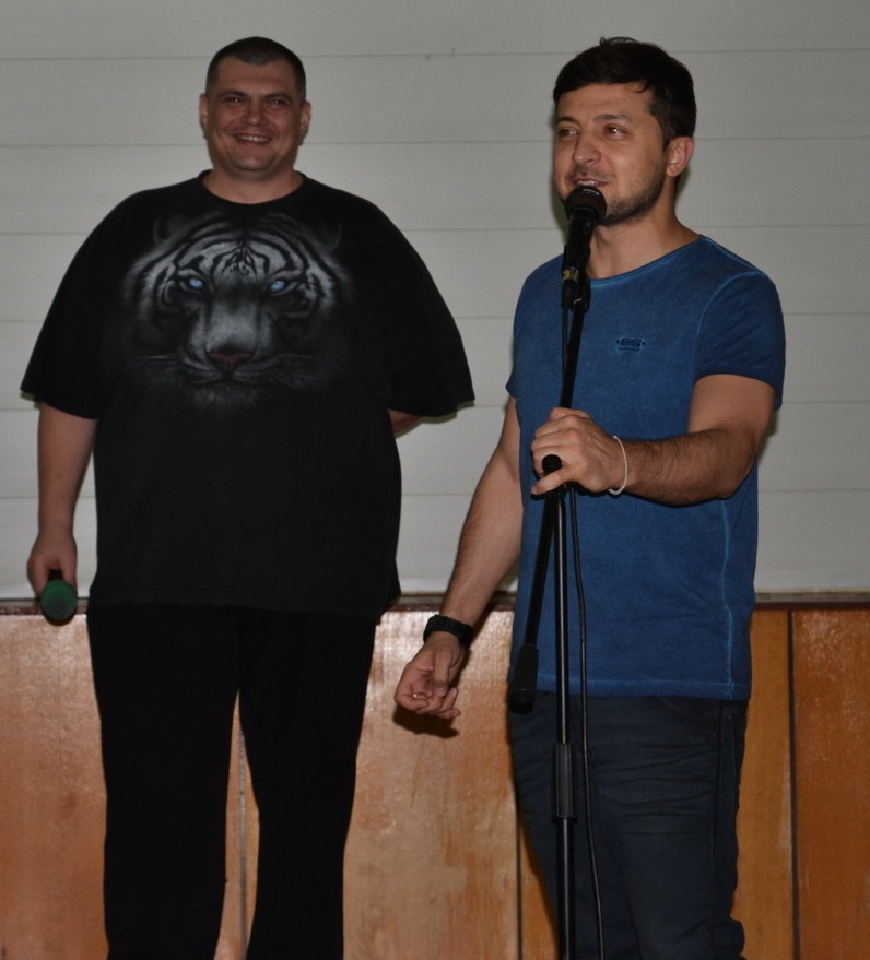 Зеленський у Військово-медичному клінічному центрі Південного регіону в Одесі.